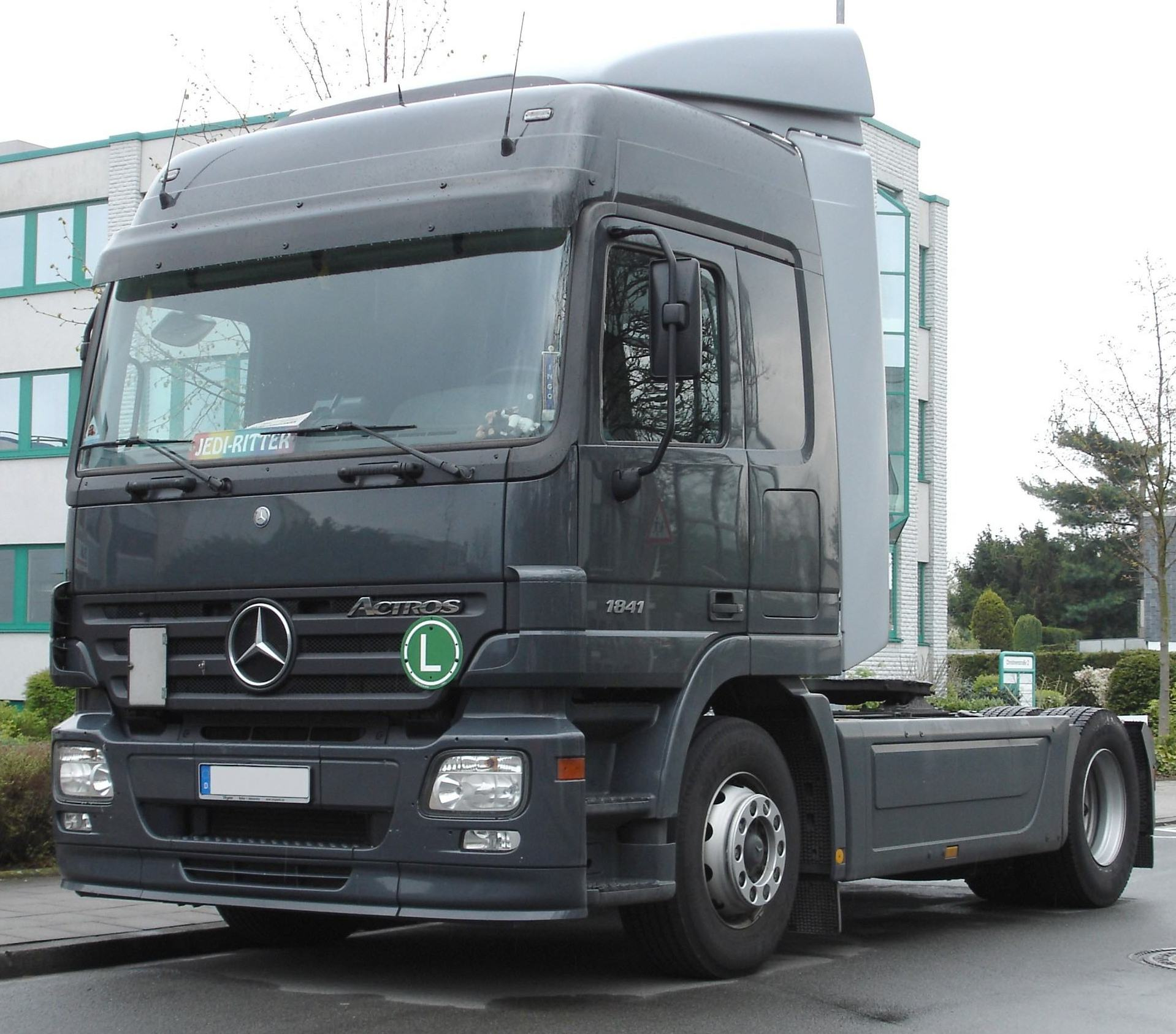 Mercedes Actros mit mittlerem Fernverkehrsfahrerhaus der Modelreihe MP2